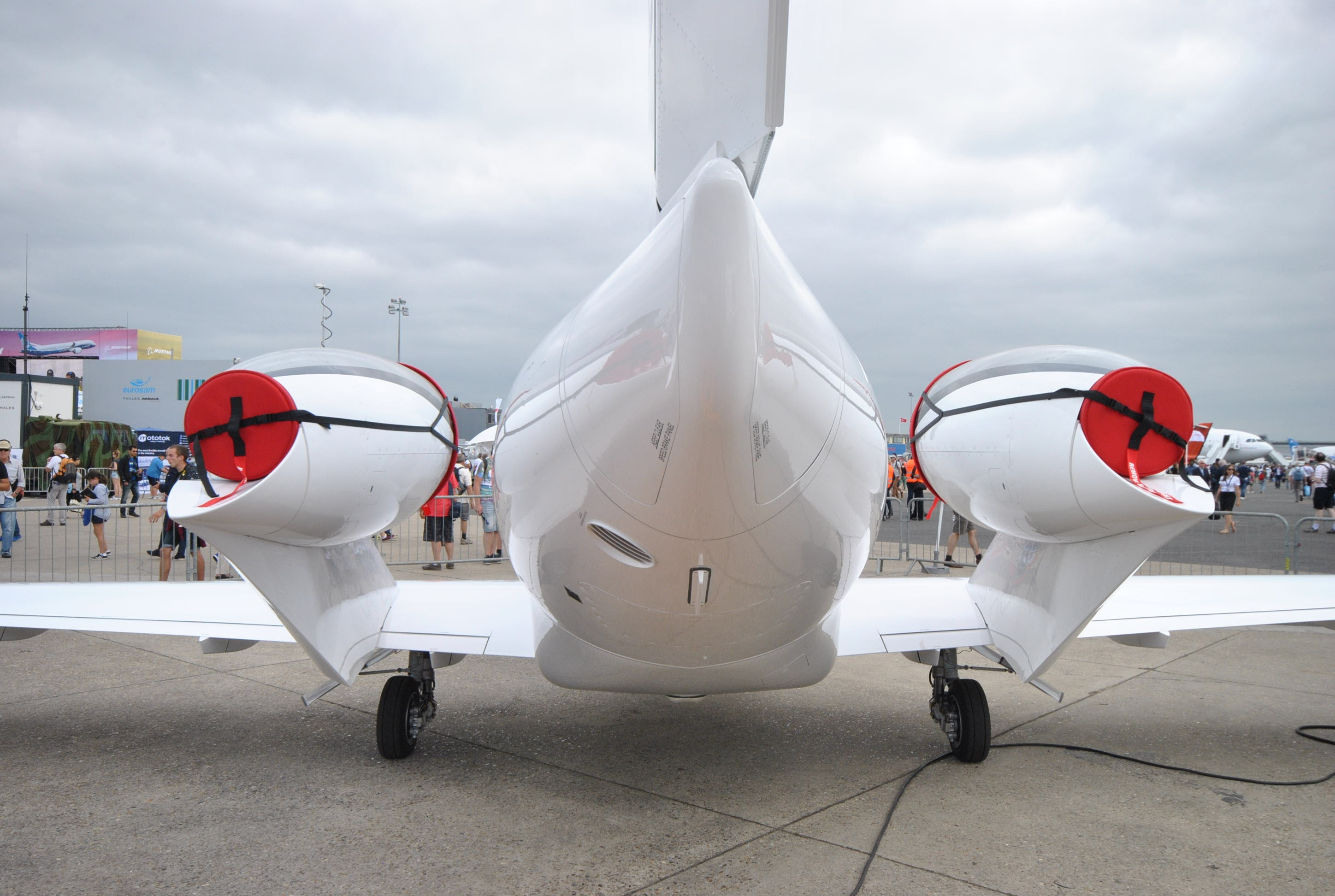 Paris Air Show 2017 Honda HA-420 HondaJet